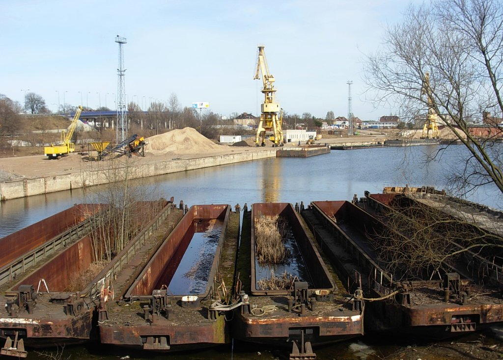 Port Żeglugi Bydgoskiej